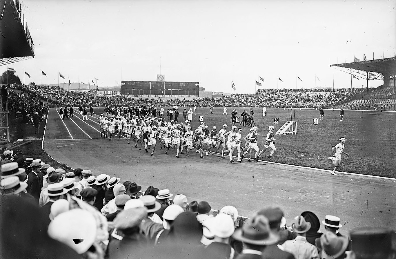 Départ du marathon le 13 juillet 1924 au stade olympique de Colombes lors des JO 1924 de Paris